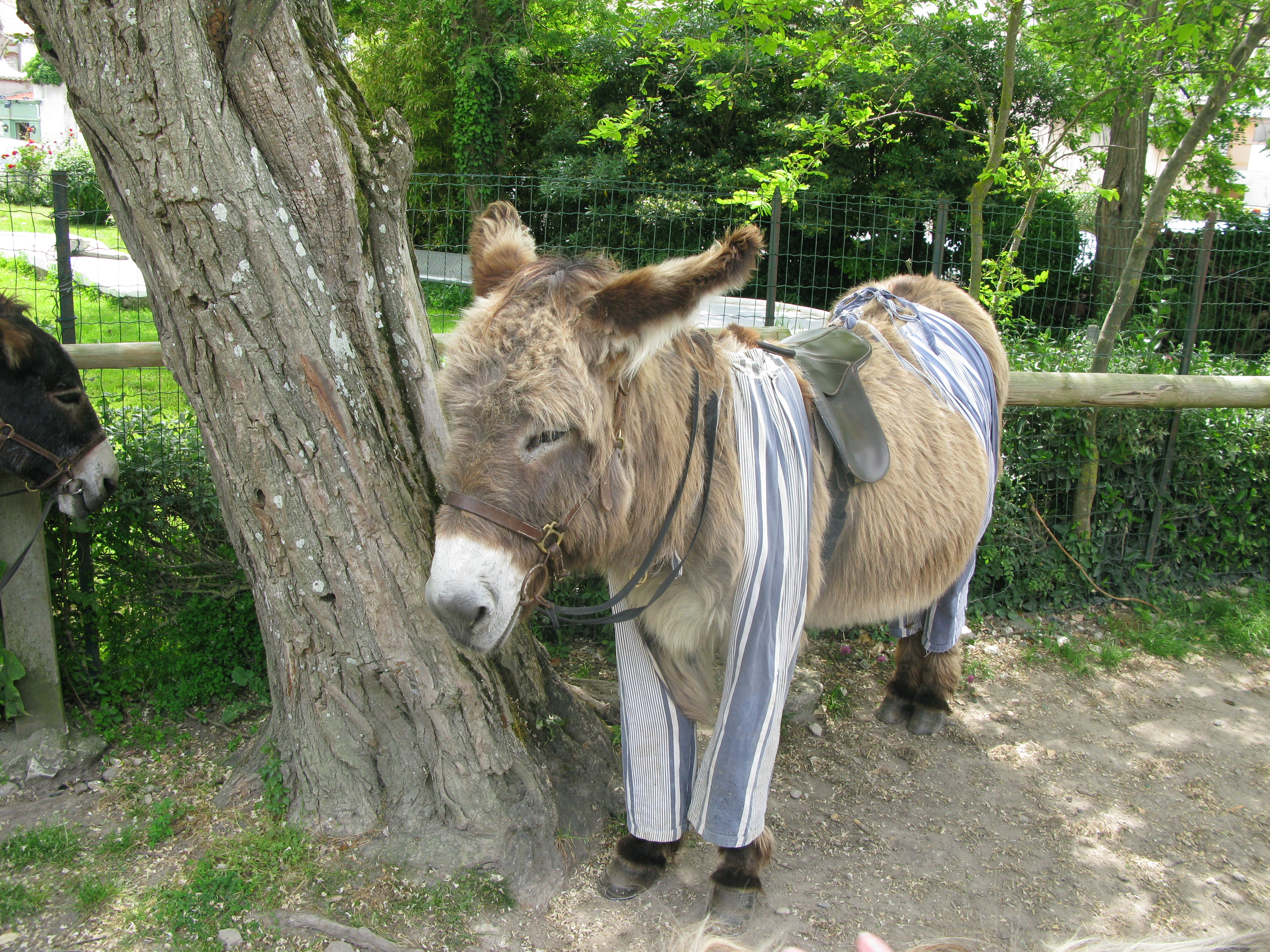 Baudet du Poitou (equus asinus) en culotte, à Saint-Martin-de-Ré.